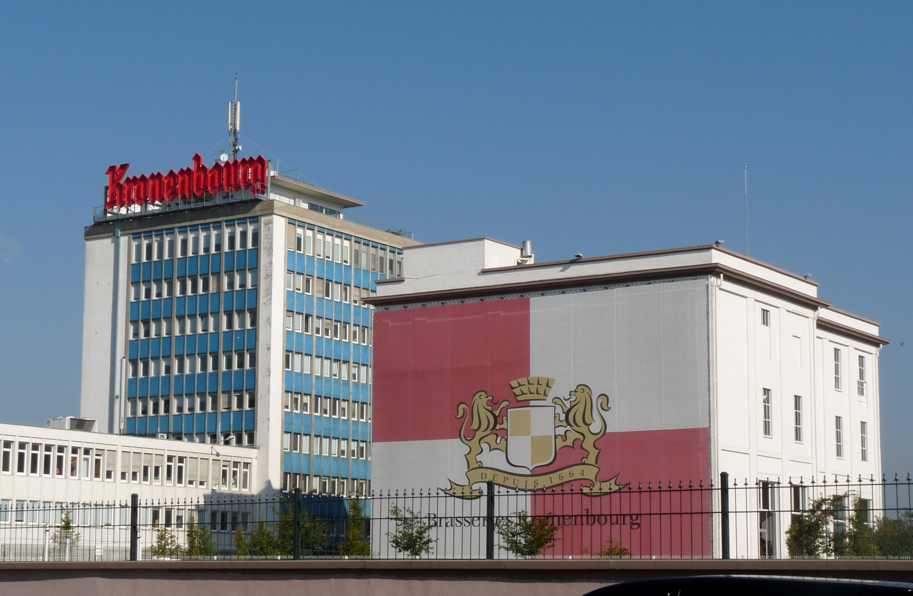 Siège social des brasseries Kronenbourg à Strasbourg-Cronenbourg, route d'Oberhausbergen.